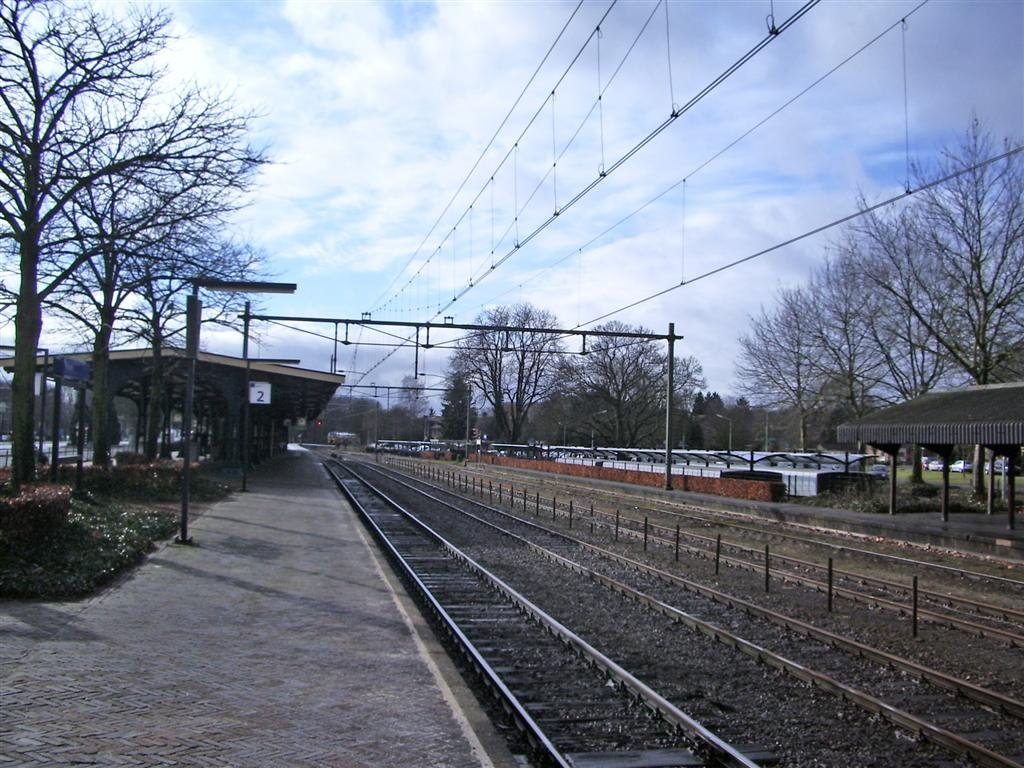 Het station van Dieren, links het NS-station, rechts het perron van de VSM.